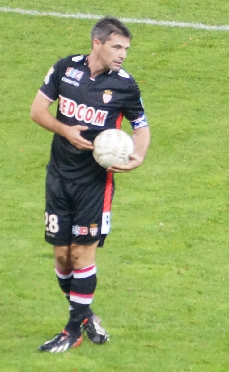 Joueur de foot en pleine action.